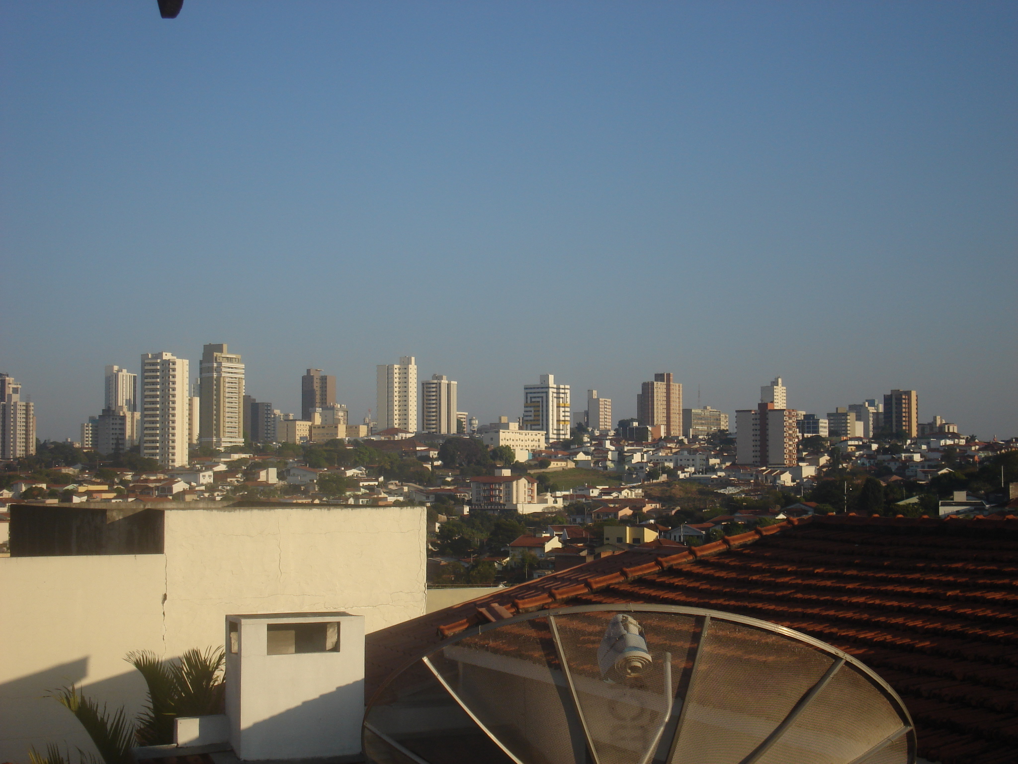 Marília's skyline, São Paulo, Brazil - Panorama de Marília, São Paulo, Brasil